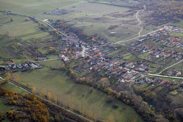 Sóly község madártávlatból